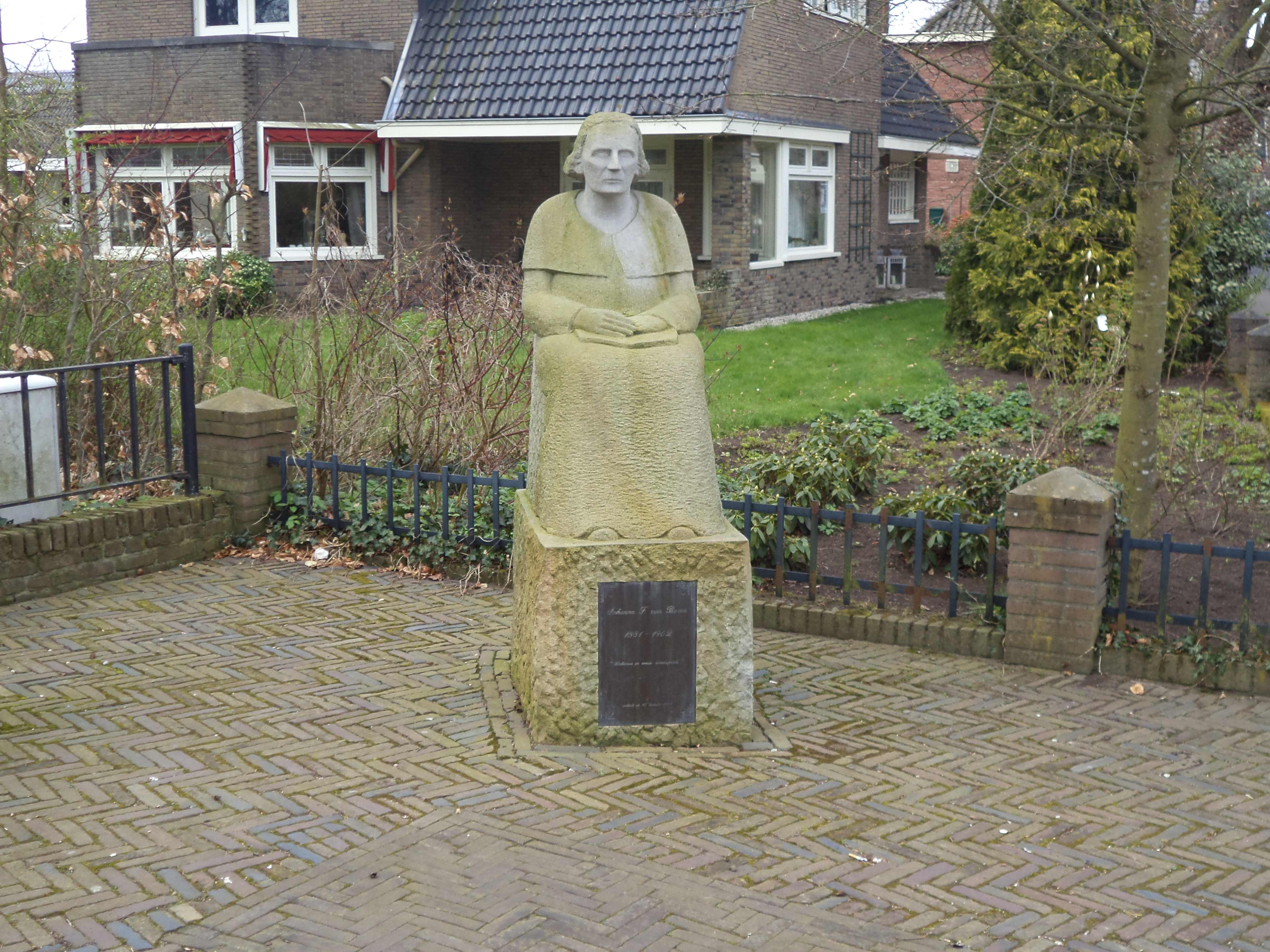 Het standbeeld van Johanna van Buren op het pleintje voor de "Oale Grieze".